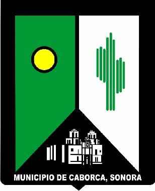 Escudo y logo de Caborca, Sonora